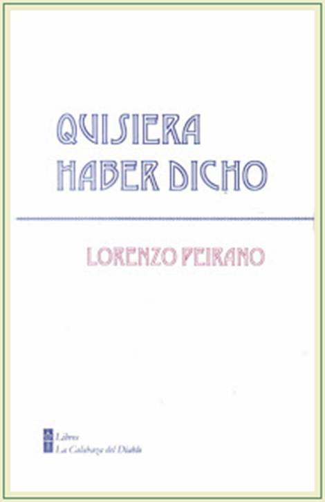 "Quisiera haber dicho" (La Calabaza del Diablo, 2010), de Lorenzo Peirano (1962), reúne poemas escritos entre 1995 y 2004, indicados en el libro como Parte I, y una Parte II con trabajos realizados en el período 2006 - 2009. Esta división cronológica es a juicio de la Crítica un hecho netamente referencial, pues el libro presenta en su conjunto una coherencia y fluidez que permite apreciarlo como una unidad sin fisuras.